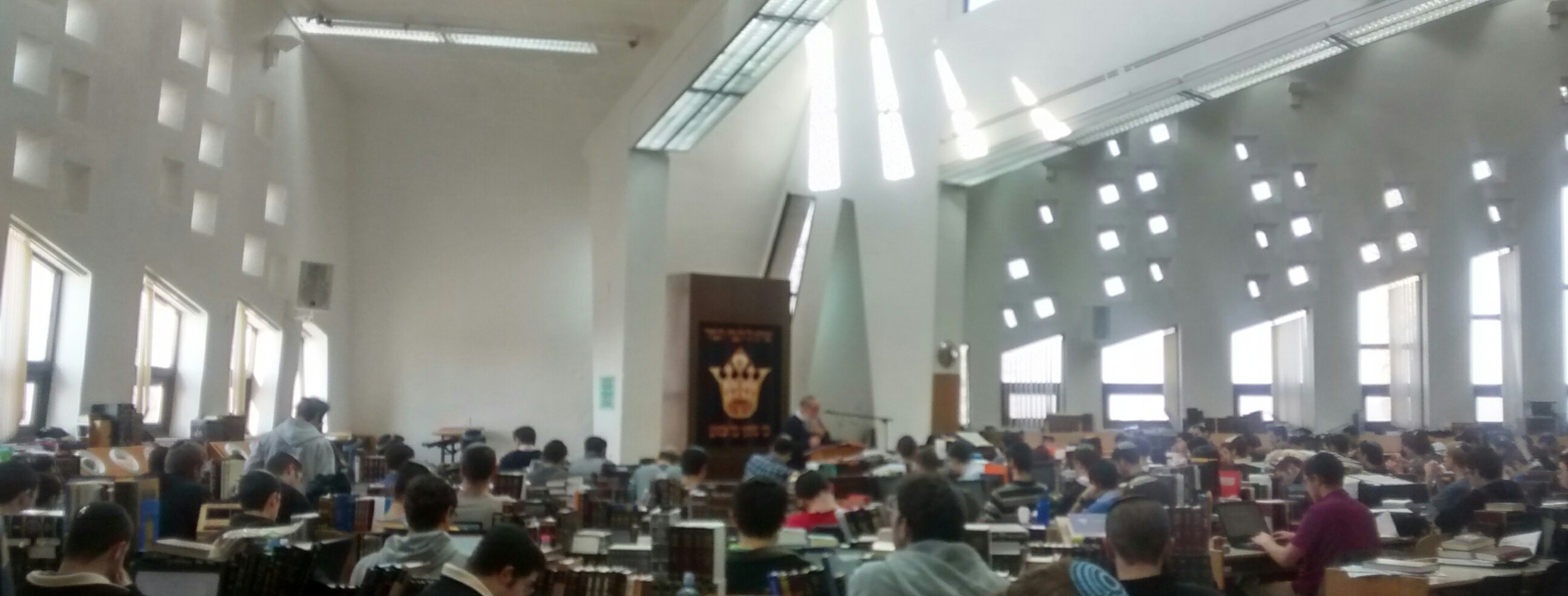 שיעור כללי של הרב ברוך גיגי בישיבת הר עציון כ"ה שבט תשע"ז